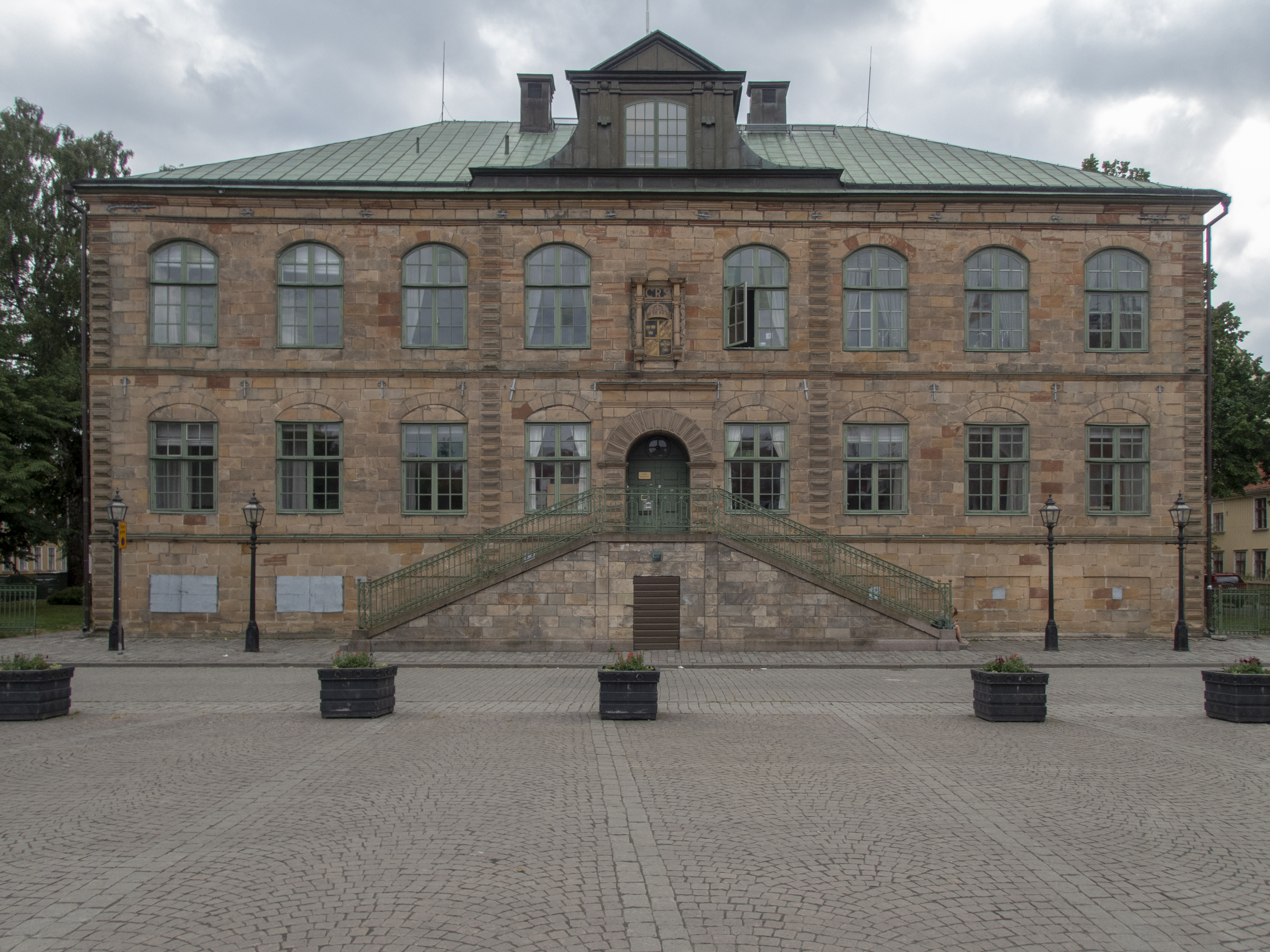 Hovrättshuset, Göta Hovrätt, Nybyggnadsår 1639 - 1655 Simon de la Vallée (Arkitekt)